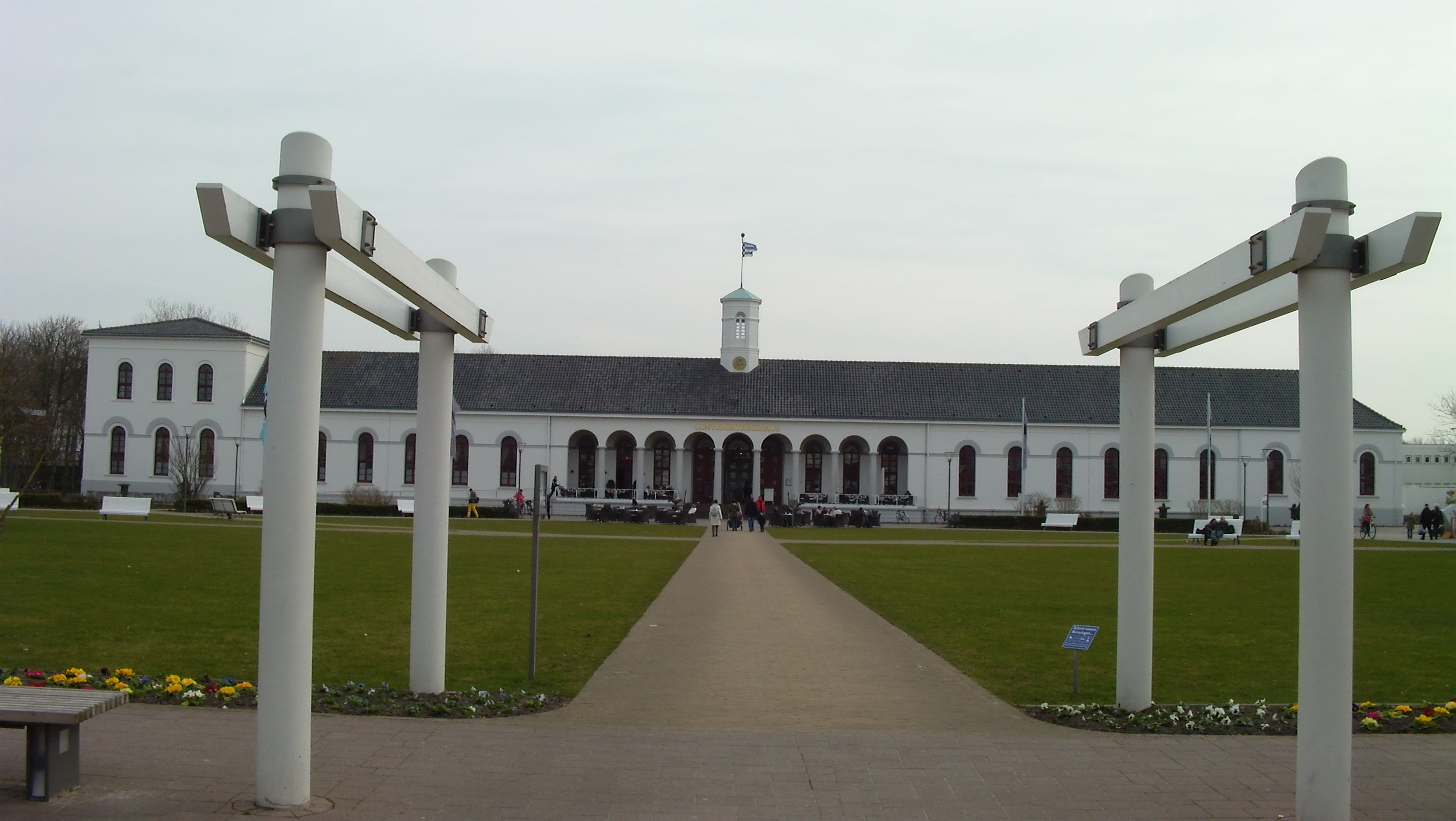 Das Conversationshaus Norderneys 2010